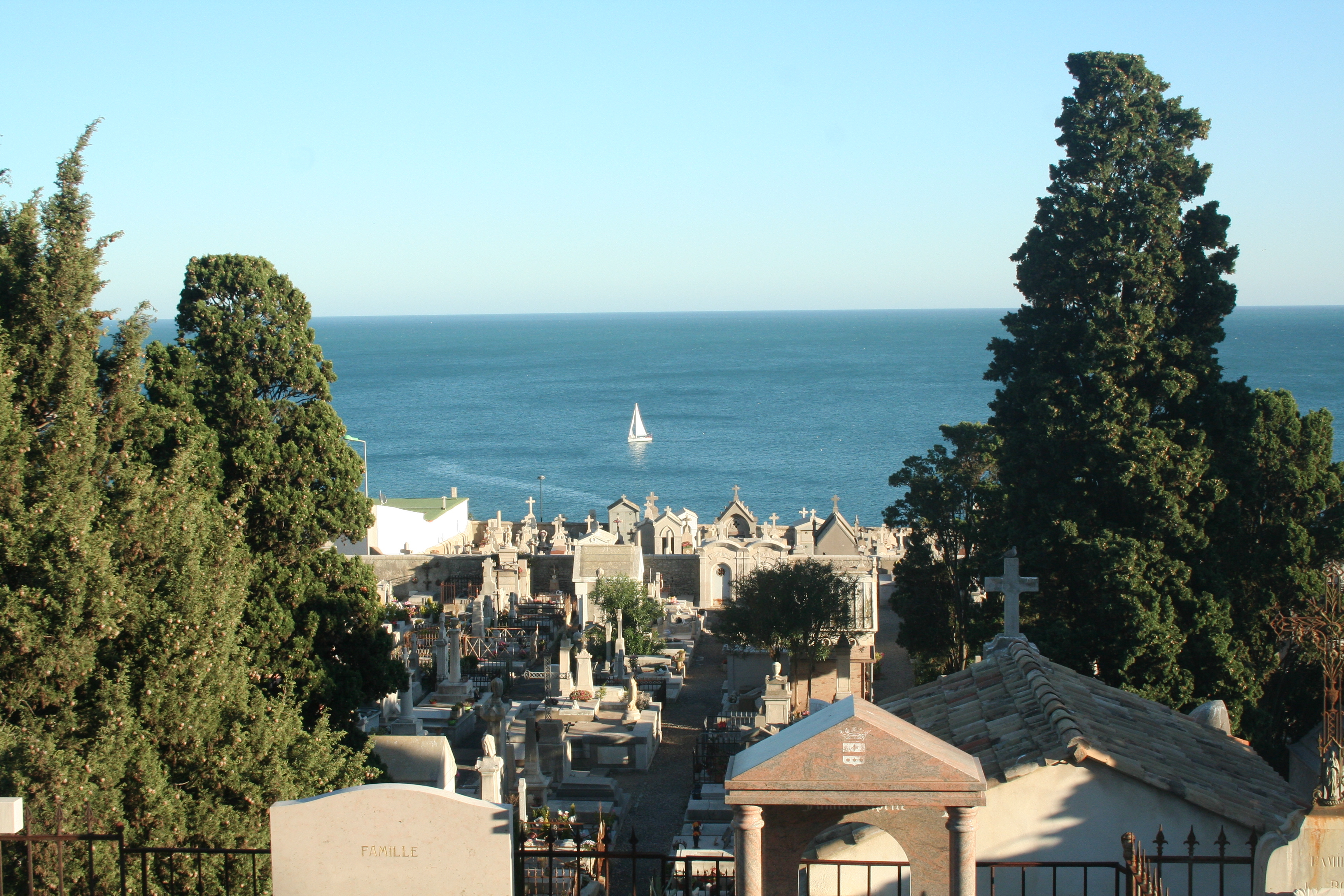 Sète (Hérault) - cimetière marin - Ce toit tranquille, où marchent des colombes, Entre les pins palpite, entre les tombes. Paul Valéry